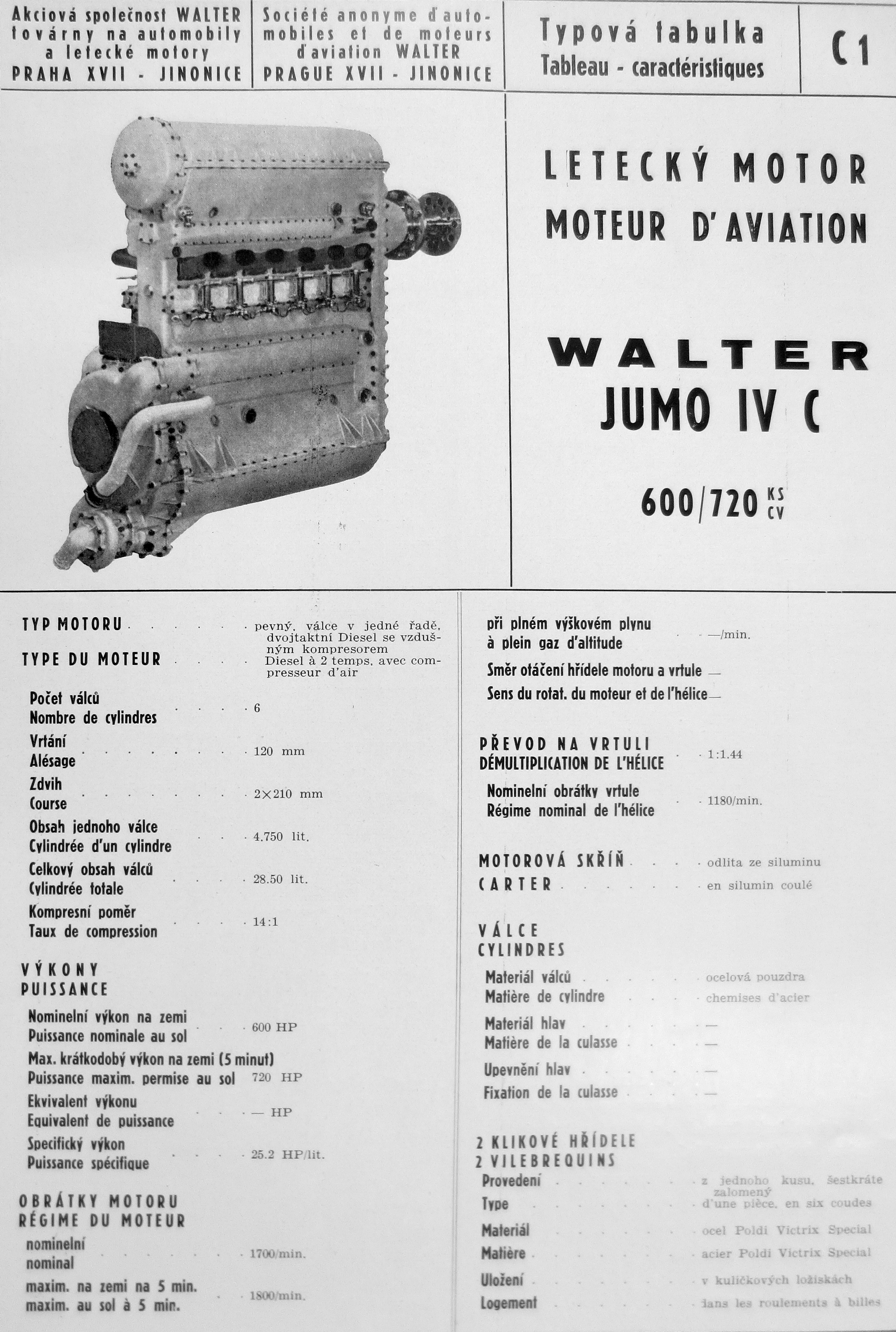 Walter Jumo IV C (Junkers Jumo 4), dieslový letecký motor